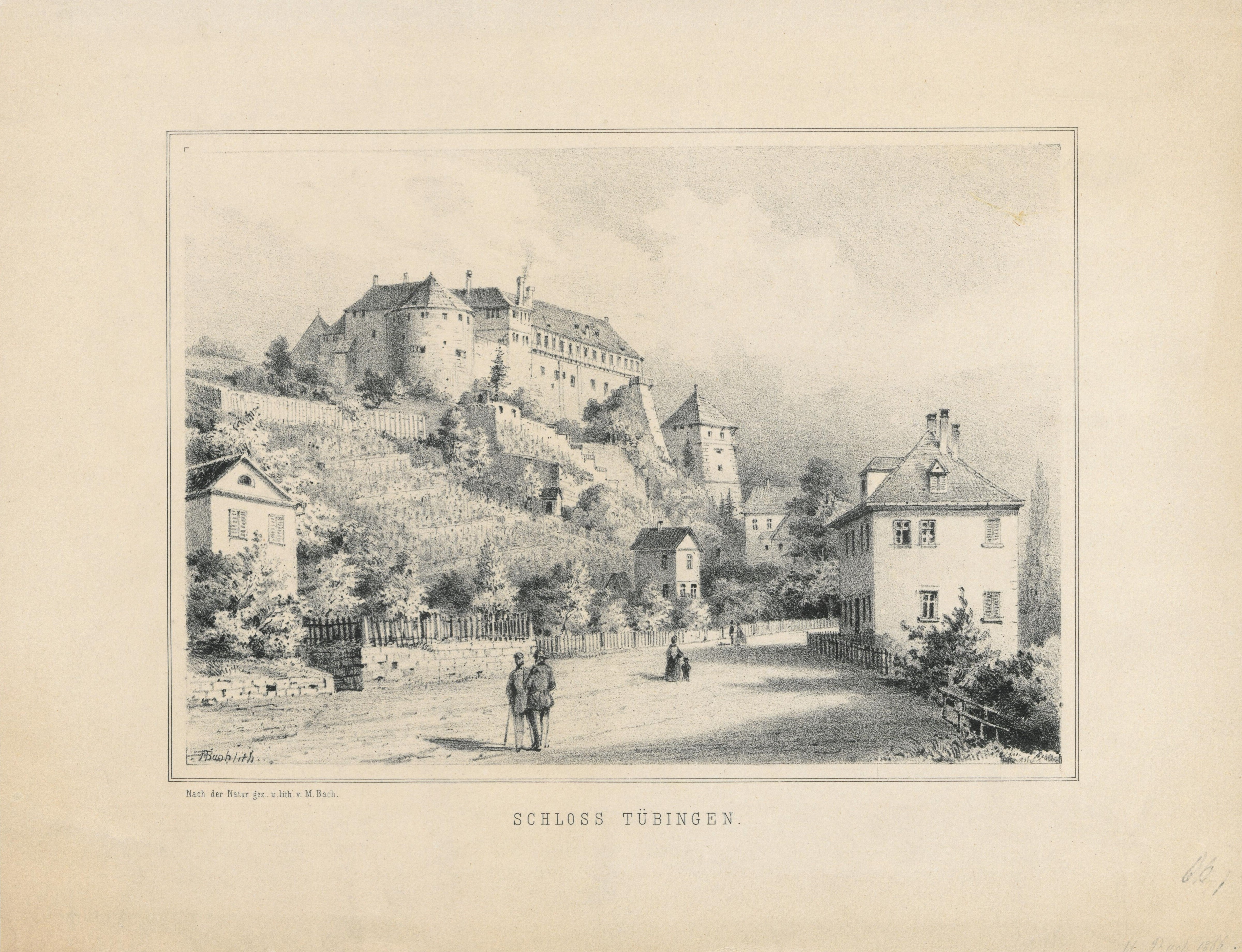 Schloss Hohentübingen. Ansicht von der Neckarhalde. (Gezeichnet und lithographiert von Max Bach) (Schefold 9488b)